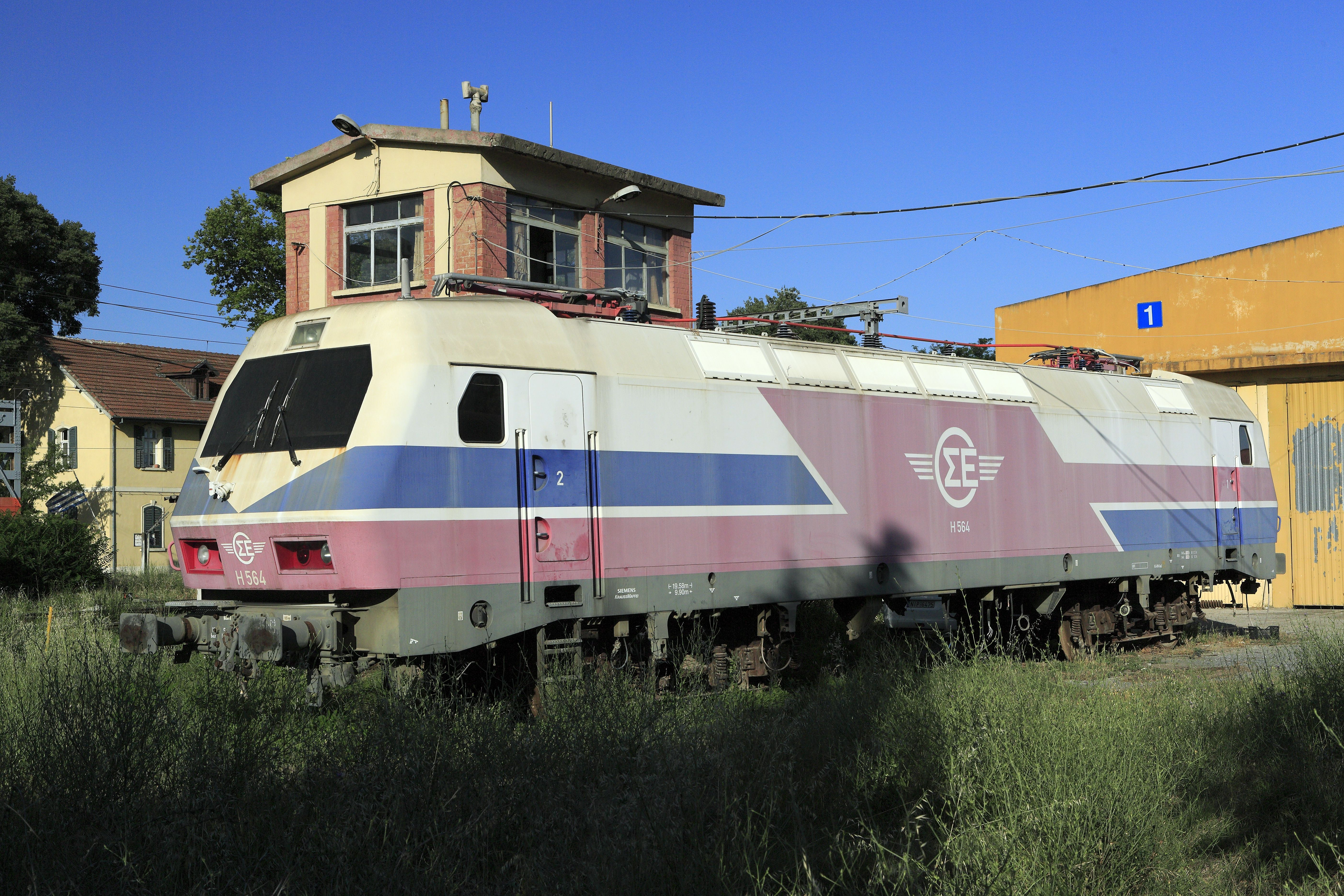 Die Maschine ist seit mindestens zehn Jahren abgestellt, sie wurde nicht auf EDV-Nummern umbezeichnet. Das scheinbare H in der Fahrzeugnummer ist ein griechisches Ita.